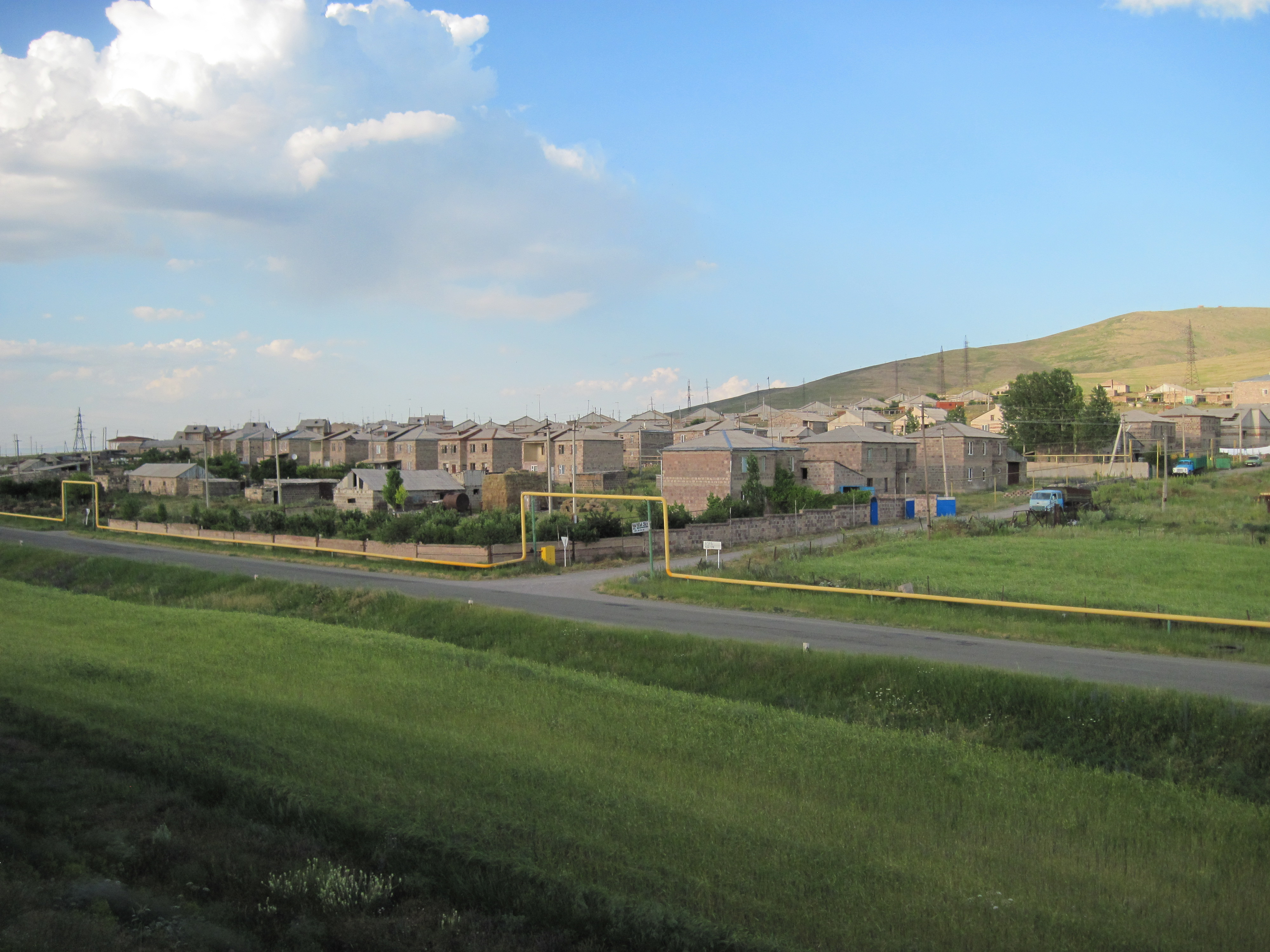 Աղին, գյուղական համայնք Հայաստանի Շիրակի մարզում